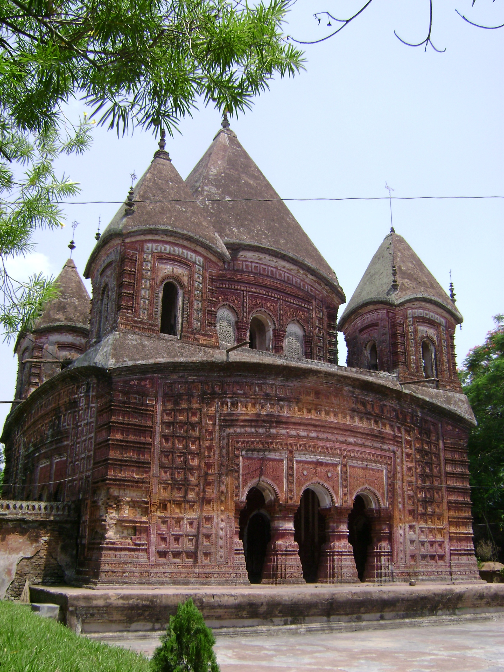 Puthia Mandirs, Chapai Nababgonj, Bangladesh